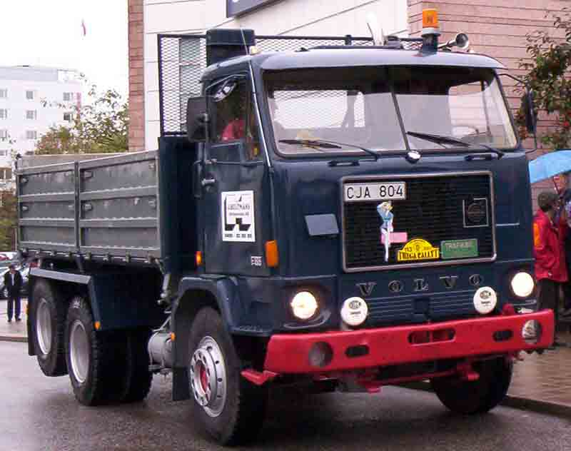 Volvo F88 Truck 1977